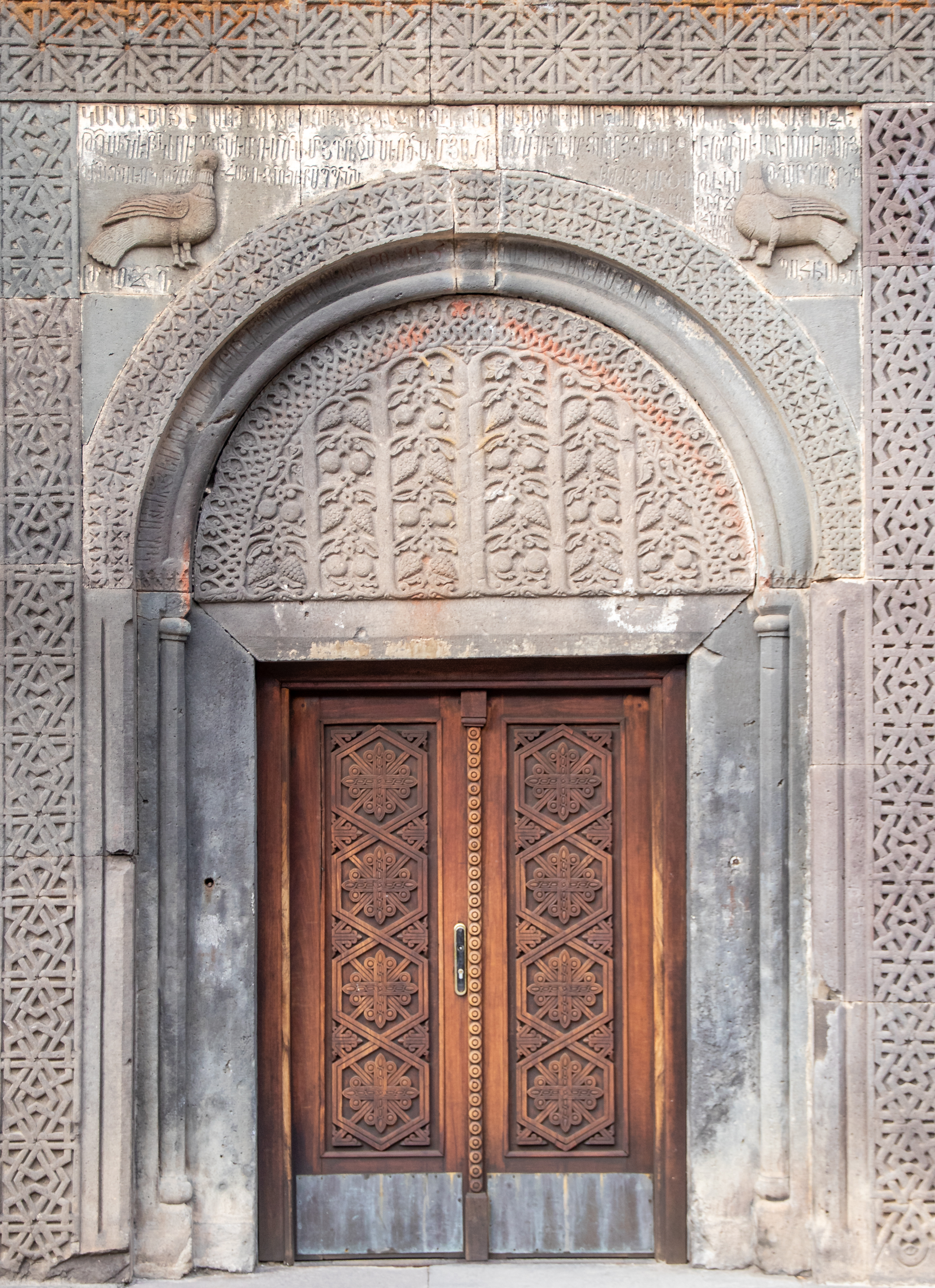 Geghard